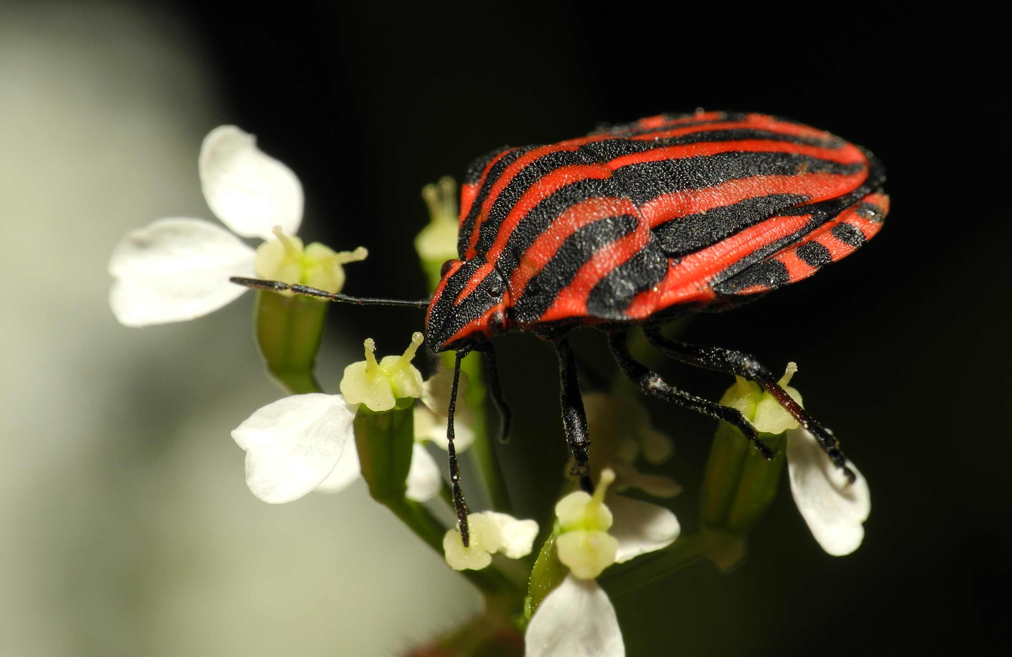 Punaise arlequin ou Graphosome italien ou Scutellère rayée ou Pentatome rayé (Graphosoma italicum). Image prise avec la bonnette Raynox DCR-250.